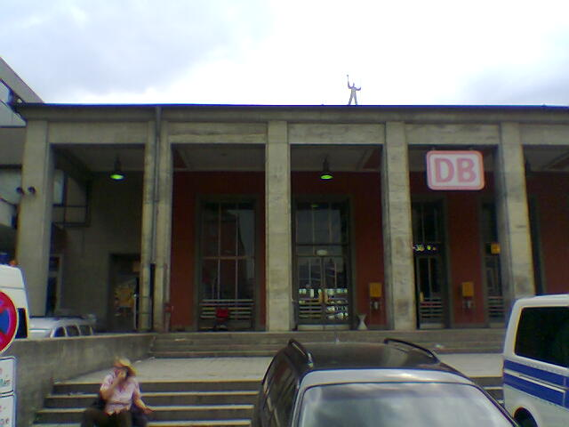 Pfeilerhalle des Starnberger Flügelbahnhofs